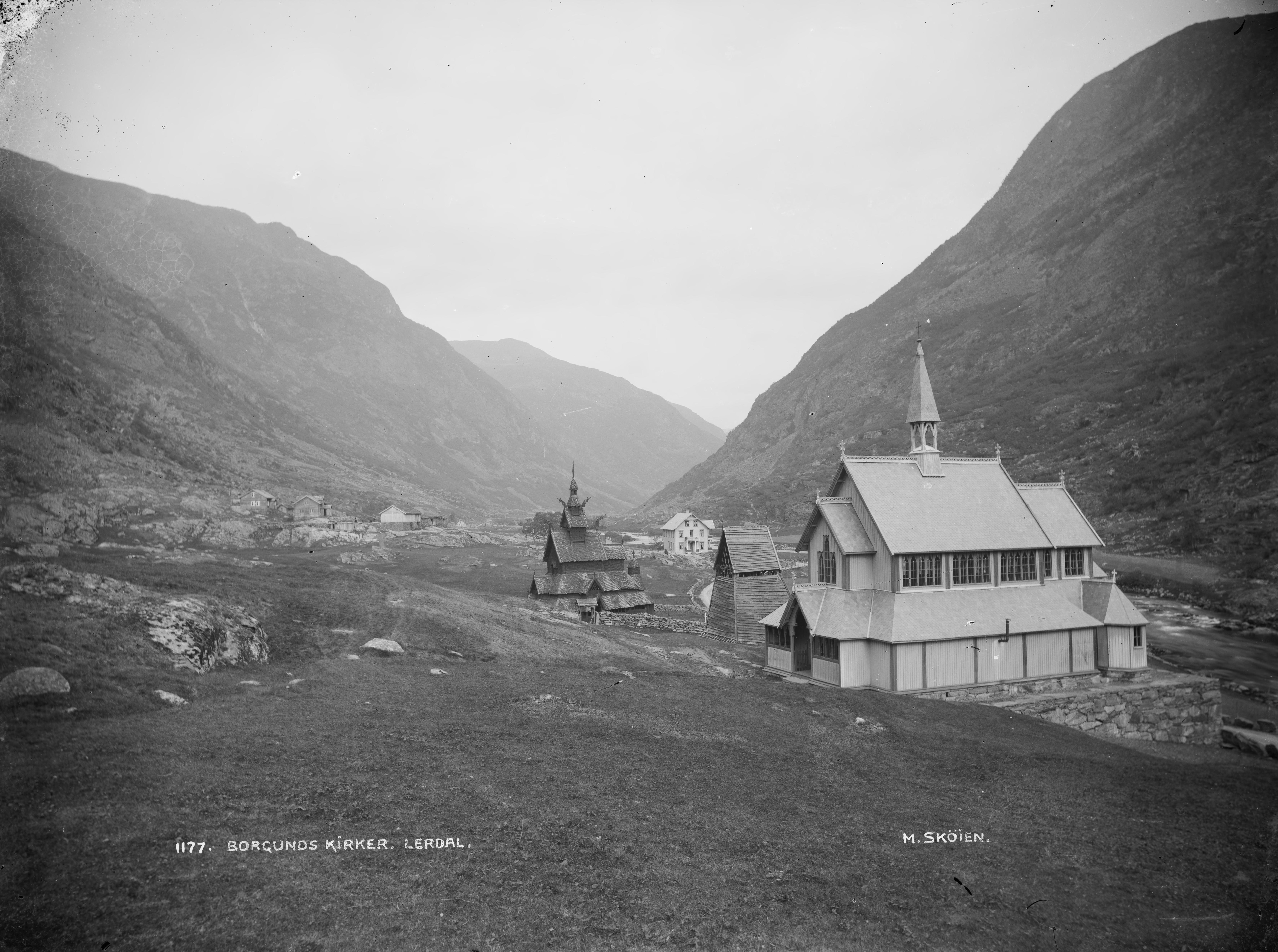 Påskrift negativ: 1177 Borgunds kirker Lerdal M.Skøien Påskrift negativ: 286 Borgund kirke [Riksantikvaren] Påskrift konvolutt: A286 Borgunds kirker [Riksantikvaren] Sted: Borgund Kommune: Lærdal Fylke: Sogn og Fjordane Tagger: landskap kirker Borgund stavkirke